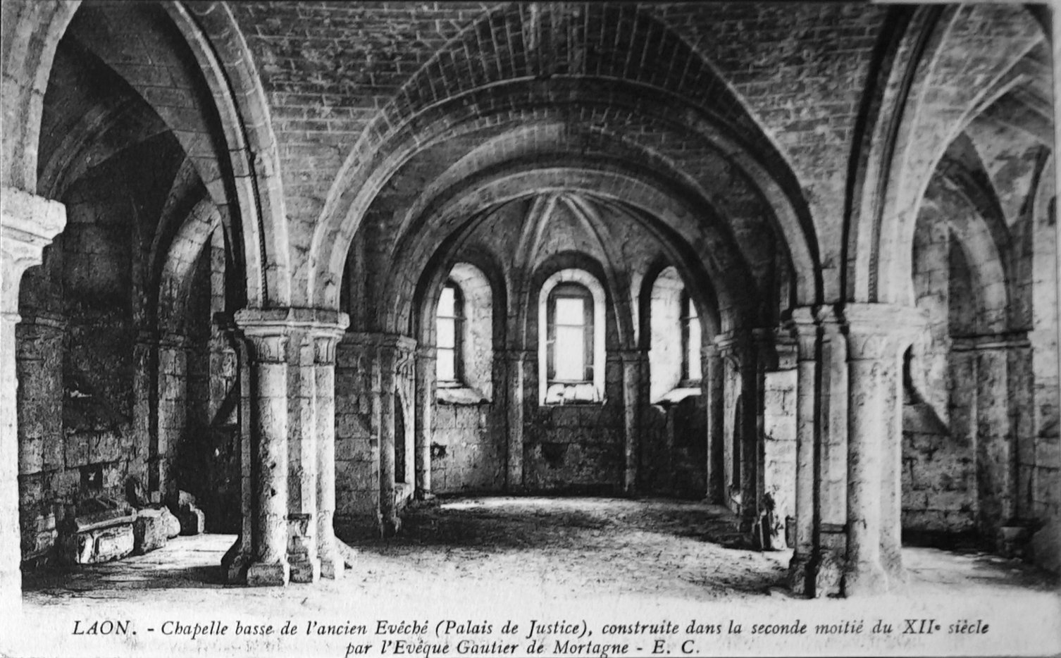 sur une carte ancienne.